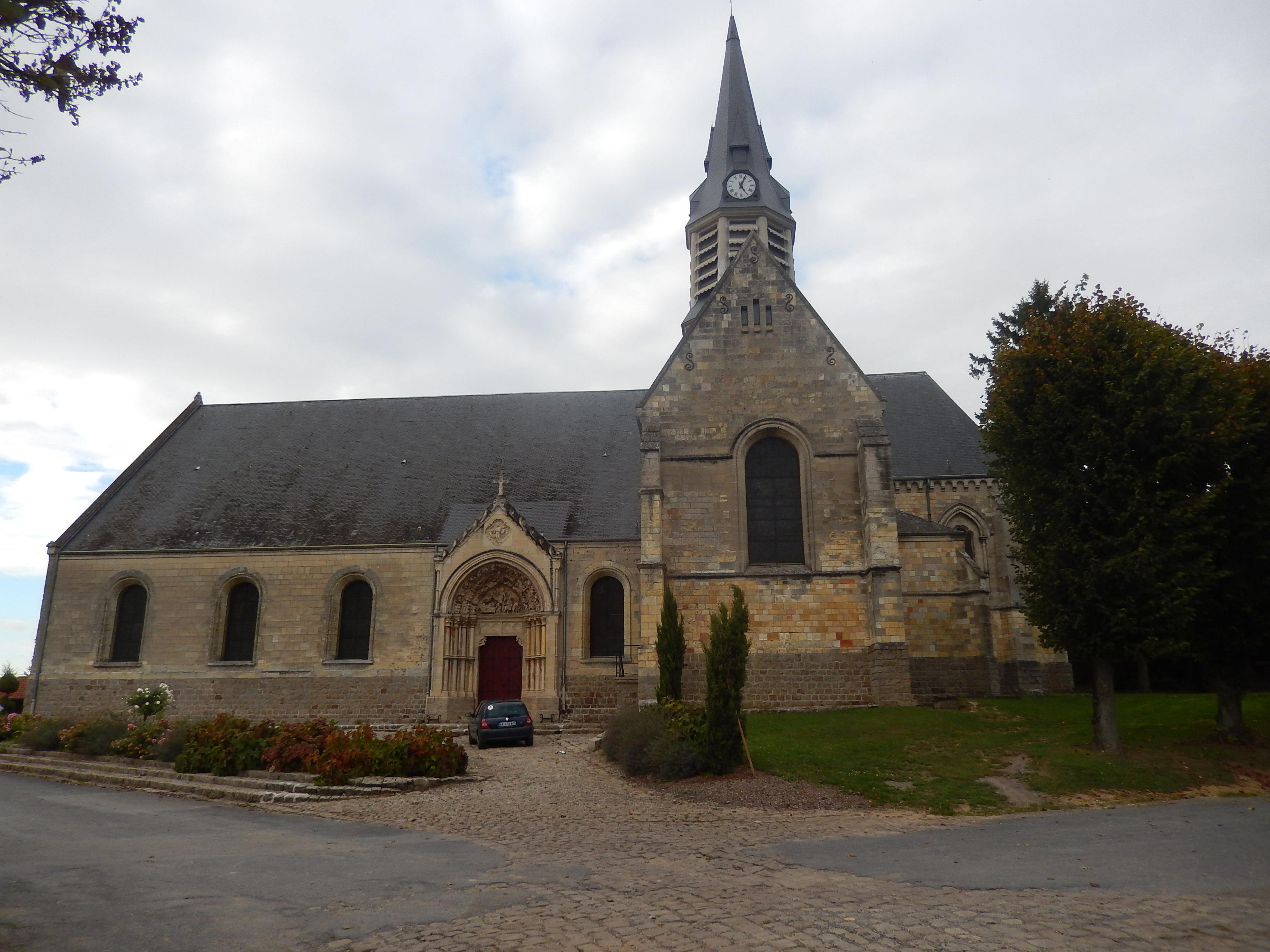 Athies (Somme) - la nef de l'église